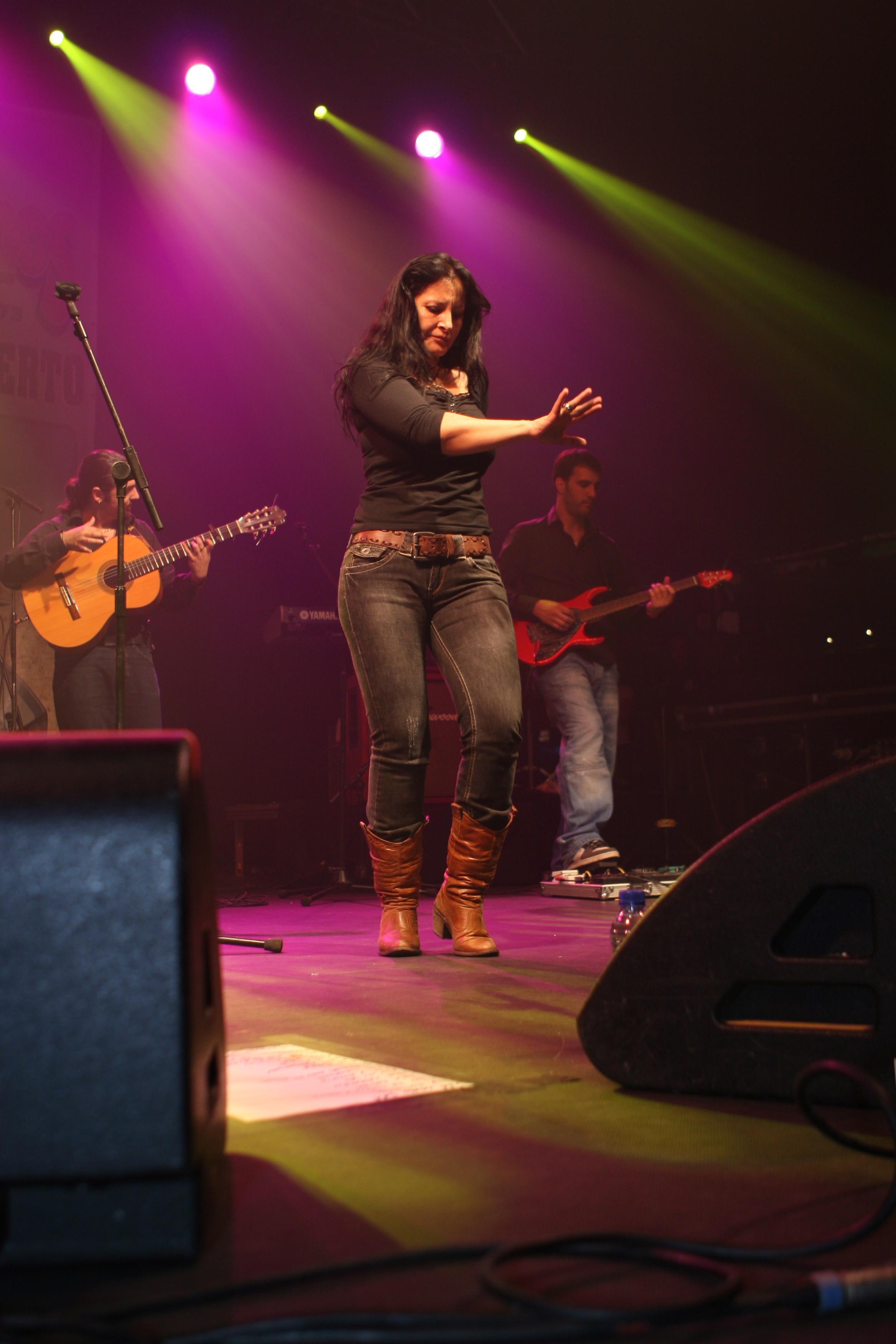 Los Chichos en la Sala Razzmatazz de Barcelona el 3 de Abril de 2009, podéis leer una crónica en